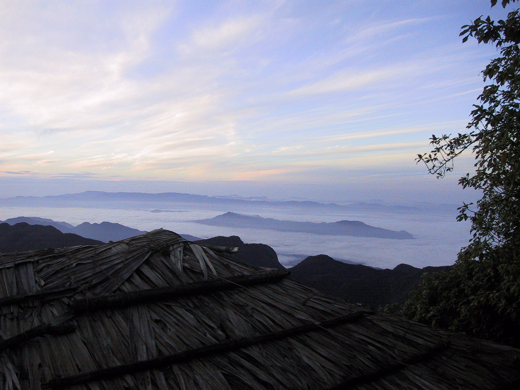 Ausblick vom Berg Sri Pada/Adam's Peak/Adams Peak; Sri Lanka.